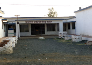 बंडोल